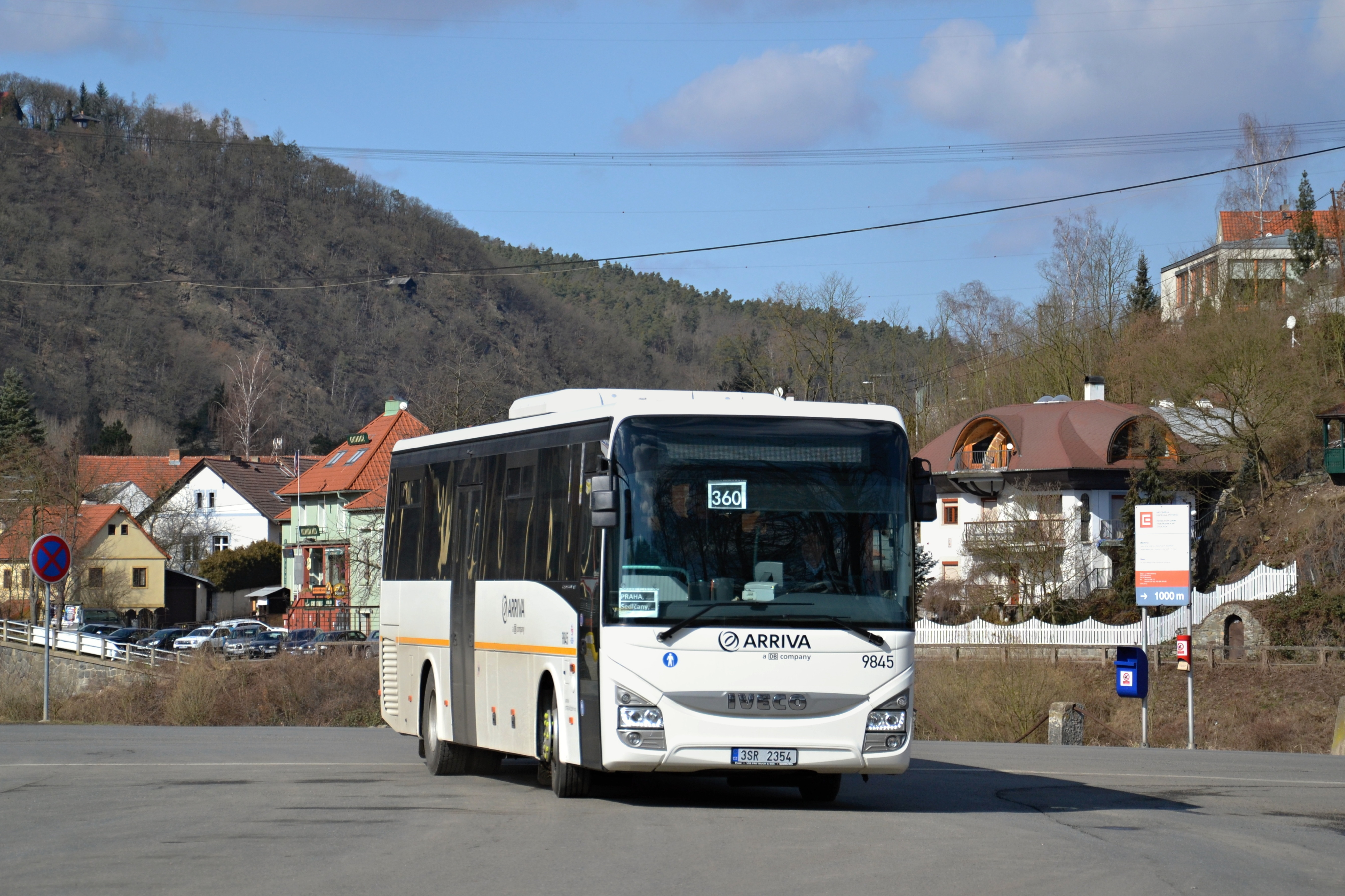 Linka 360 z Prahy do Sedlčan byla zachycena v zastávce Štěchovice